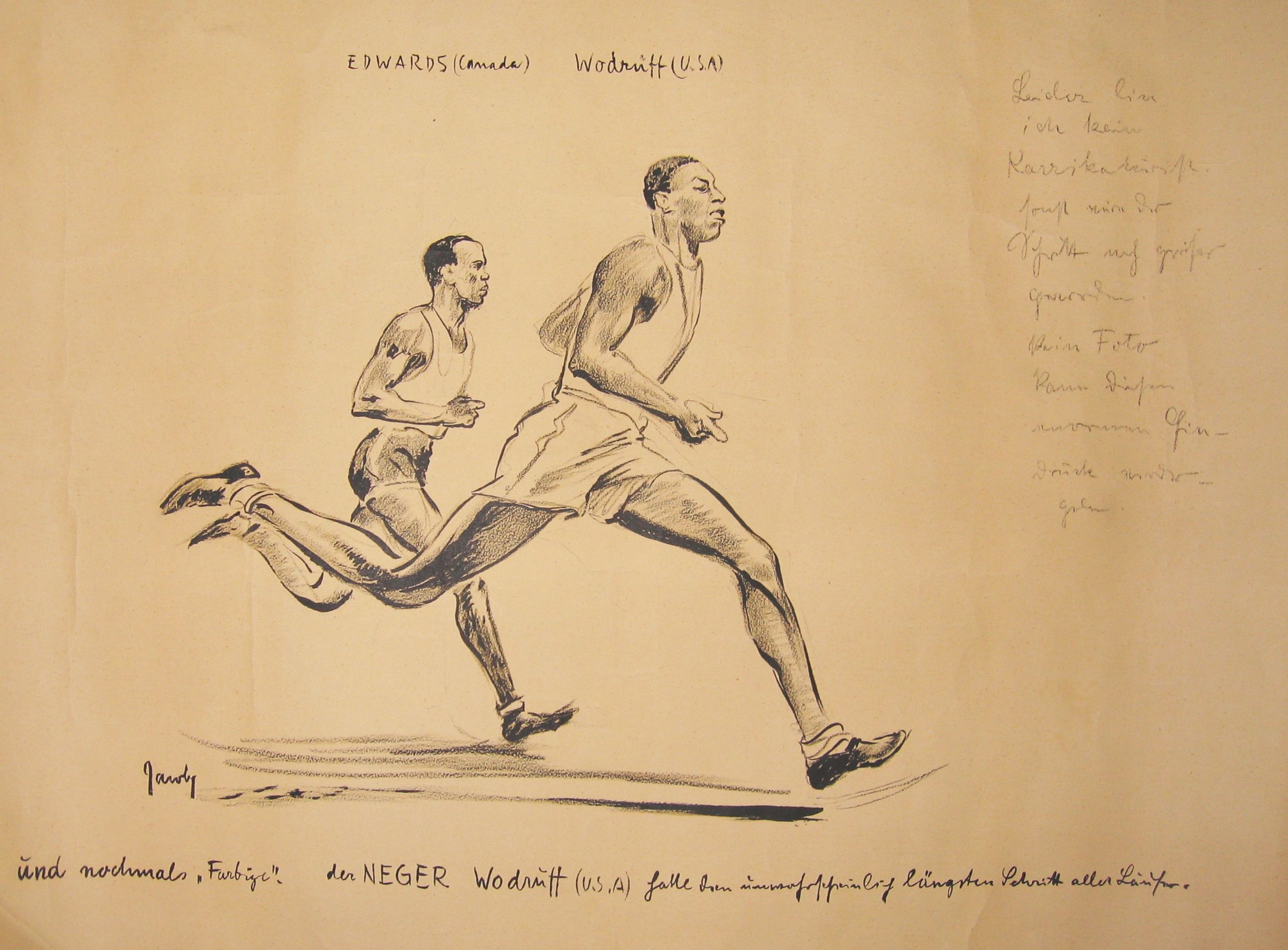 D'Leefer Phil Edwards an John Wodruff.